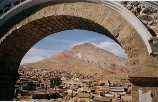 Cerro Rico, Potosi